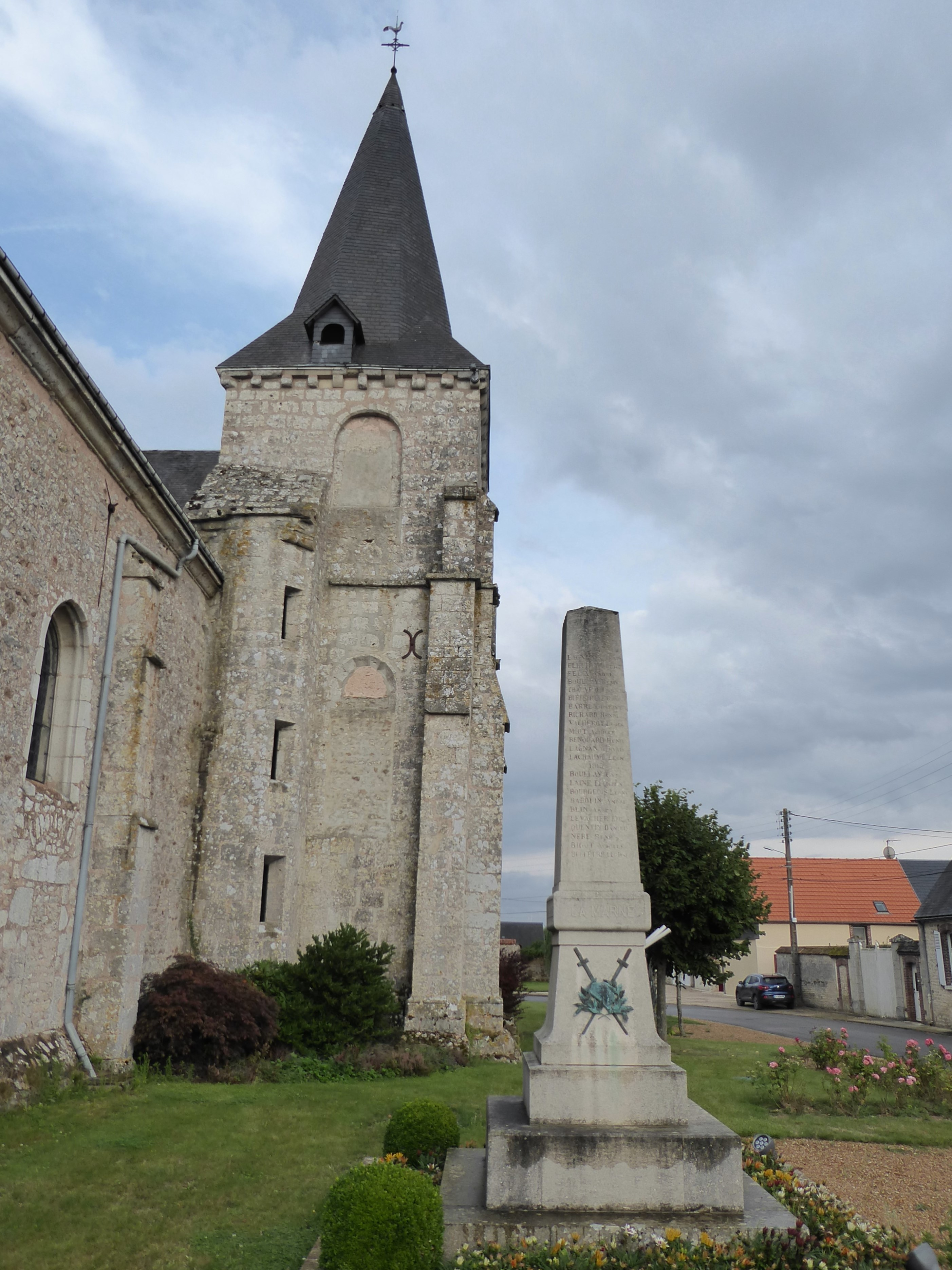 monument aux morts et église Saint-Barthélémy, Theuville, Eure-et-Loir (France).